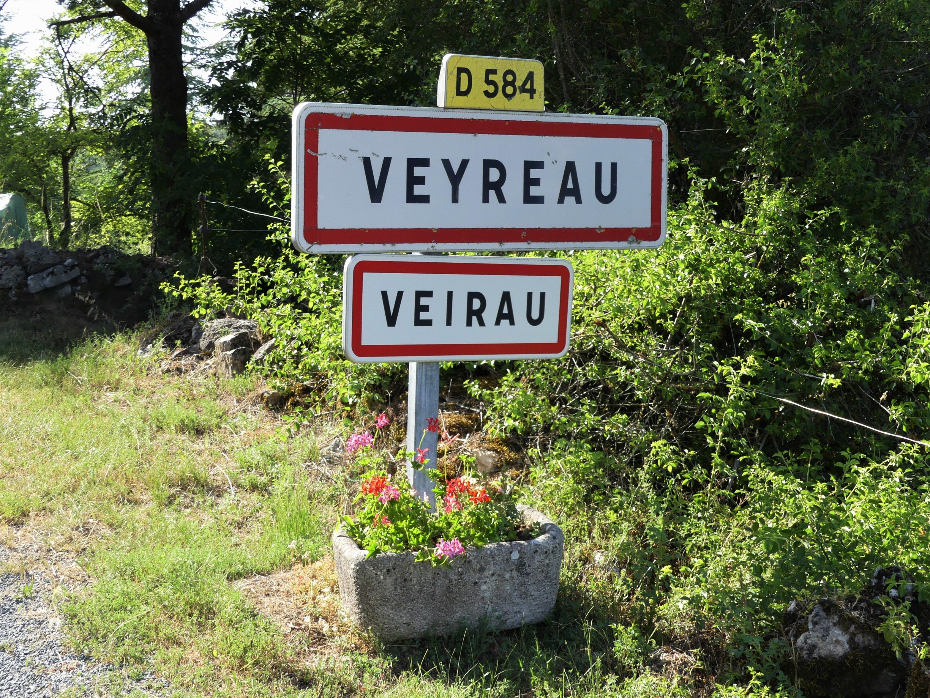 Panneau en français et occitan, Veyreau, Aveyron, France.